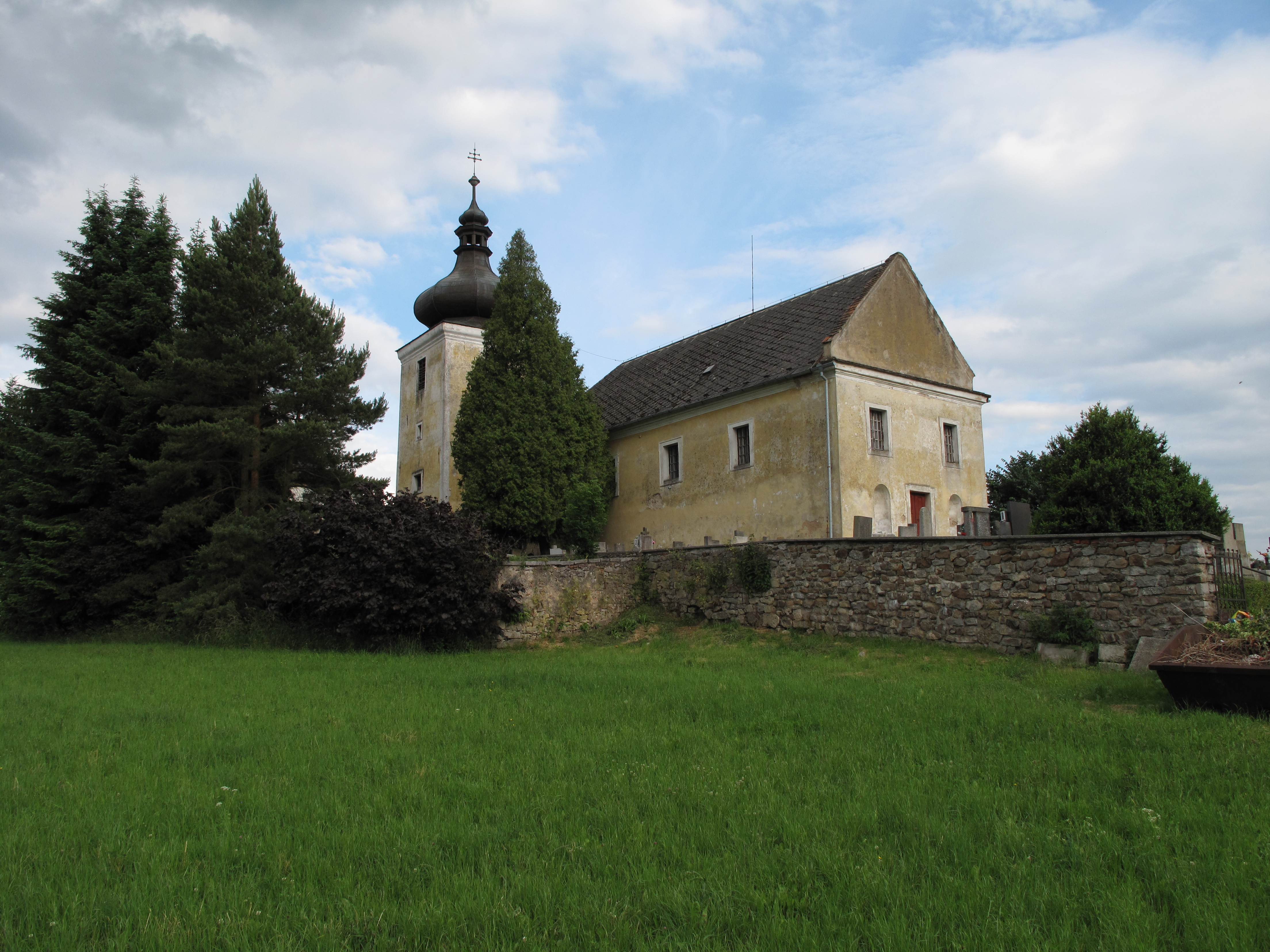 Kostel ve Skořici. Okres Rokycany, Česká republika.